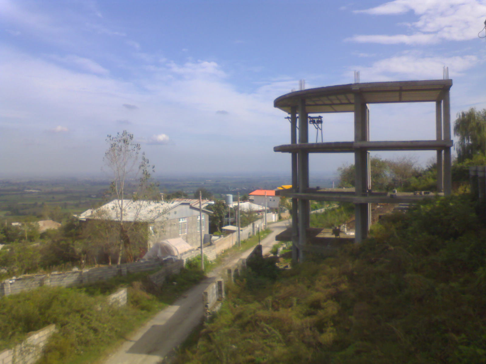 روستای زیارود شهرستان آمل